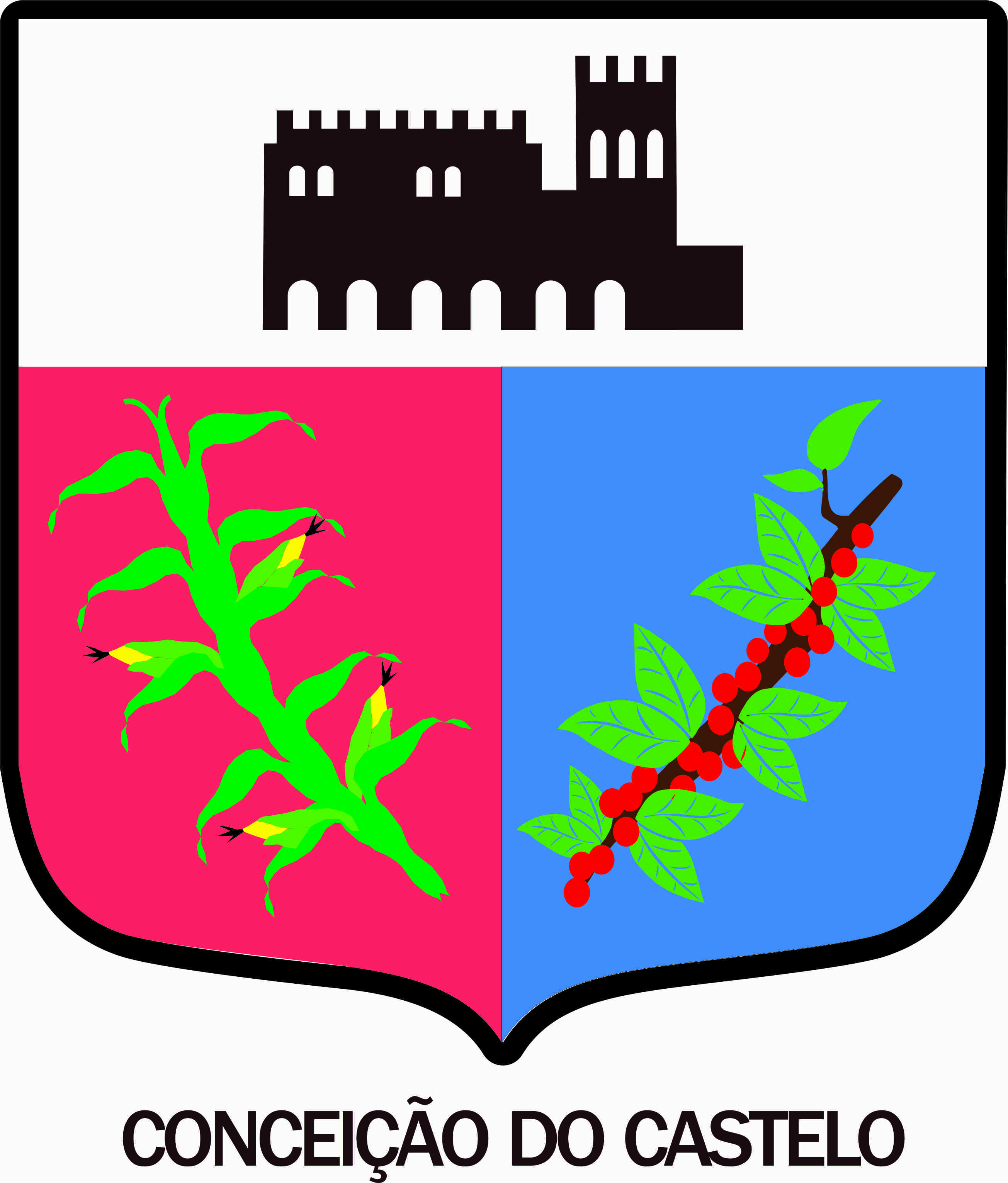 Oficial